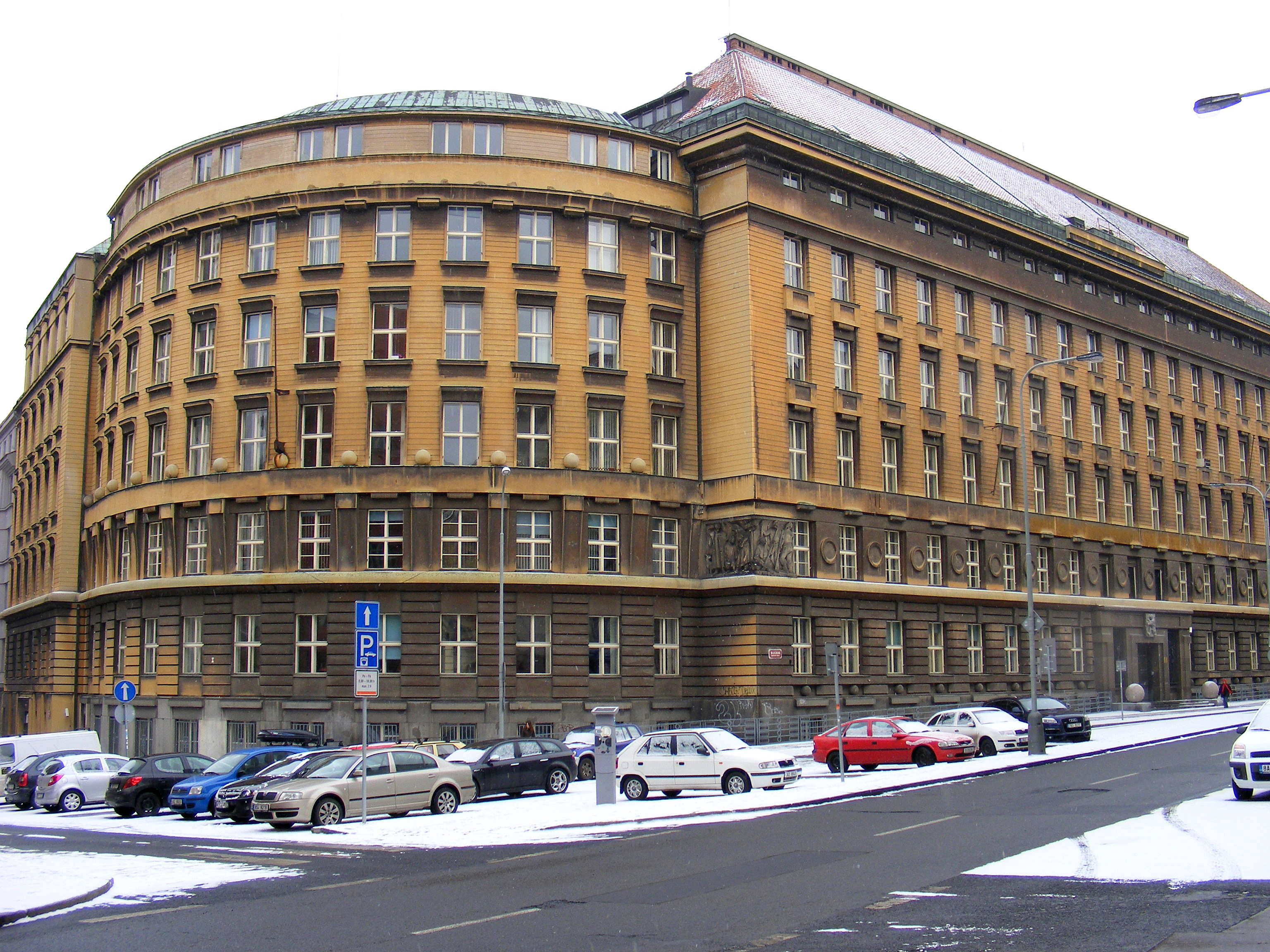 Praha Vinohrady - Budova Tabákové režie